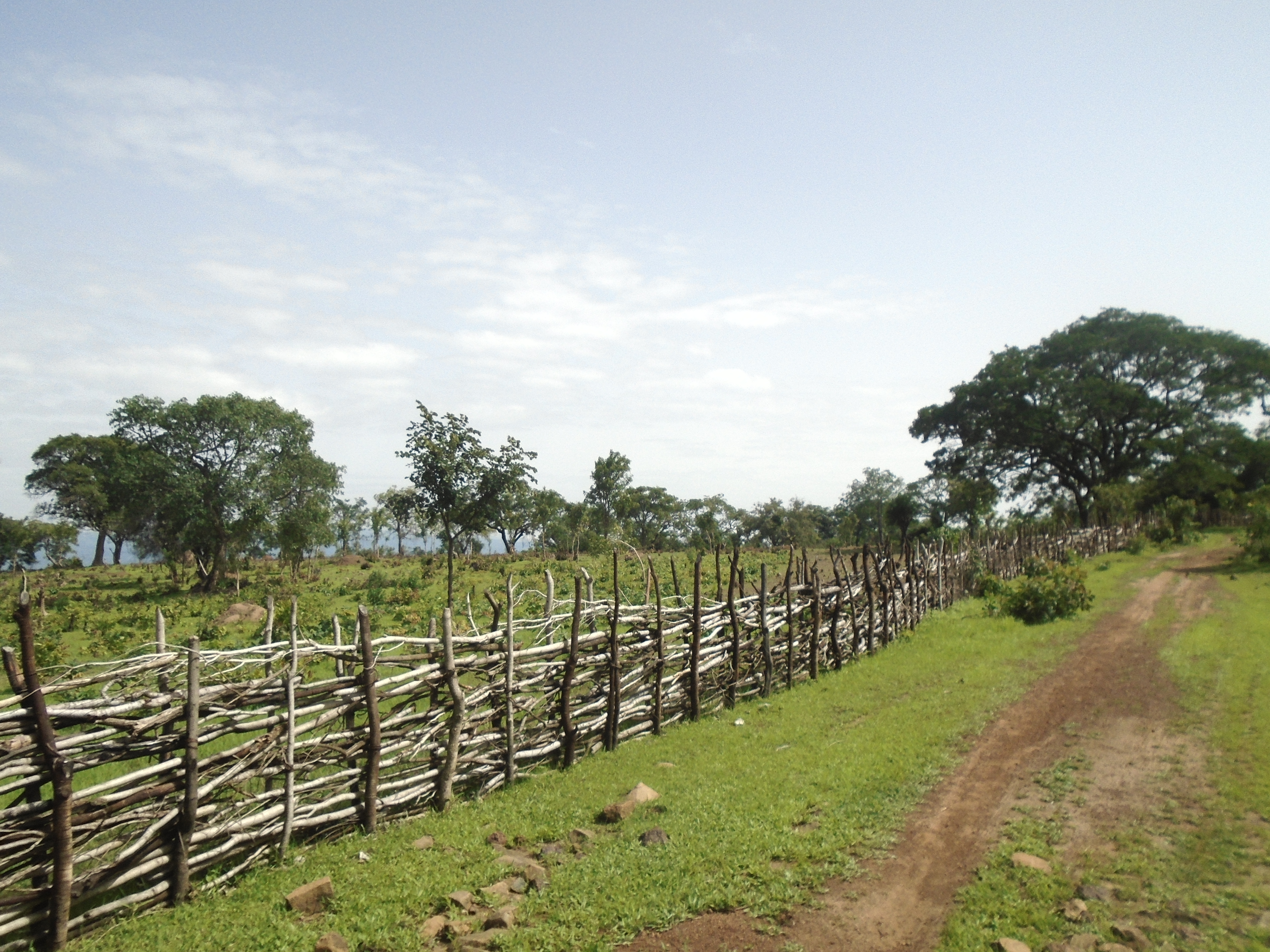 un champs de fonio a Téliré